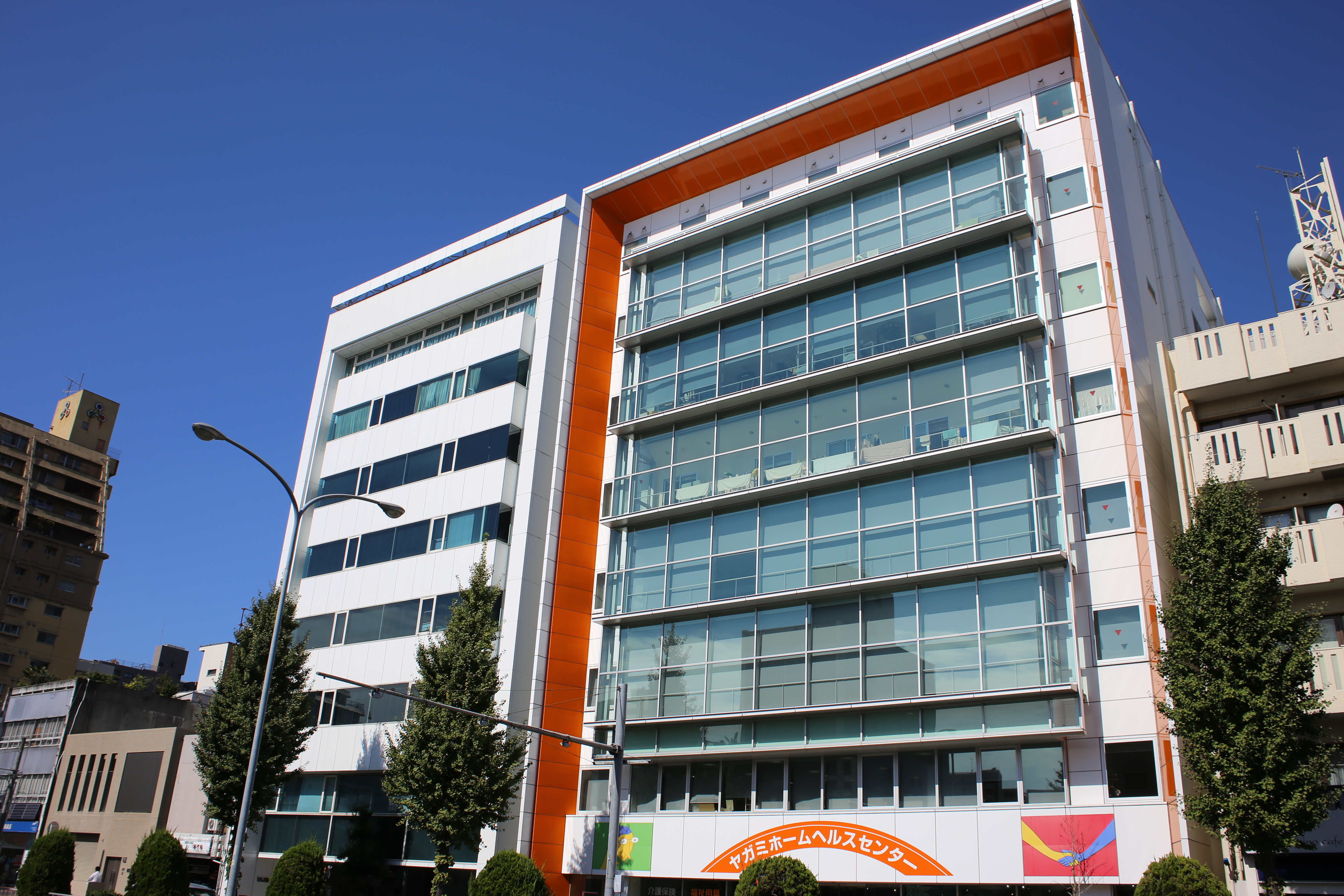 名古屋市中区千代田二丁目の八神製作所本社を南側公道東側より撮影